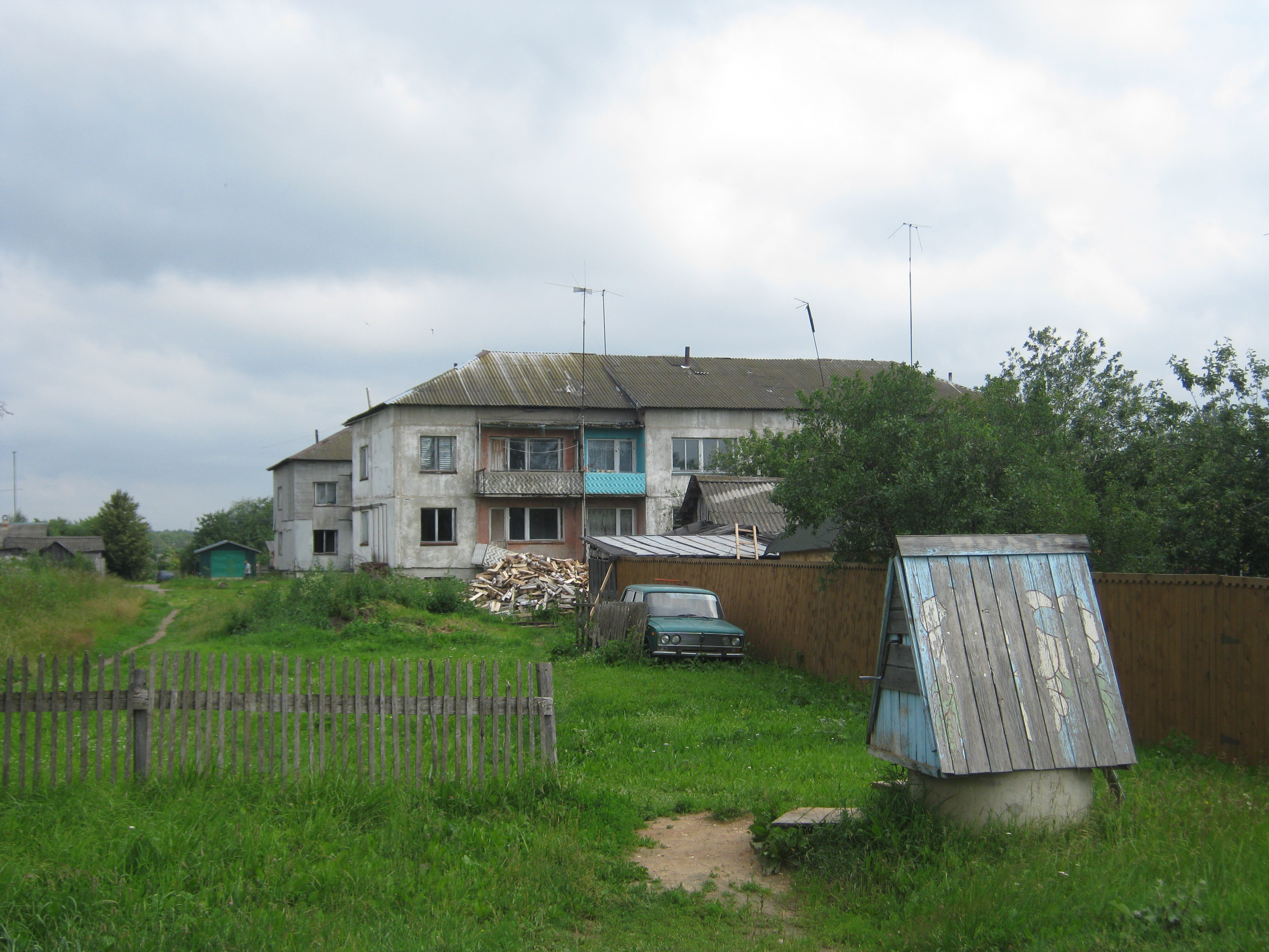 Многоквартирные дома в деревне Петушки Гагаринского района Смоленской области